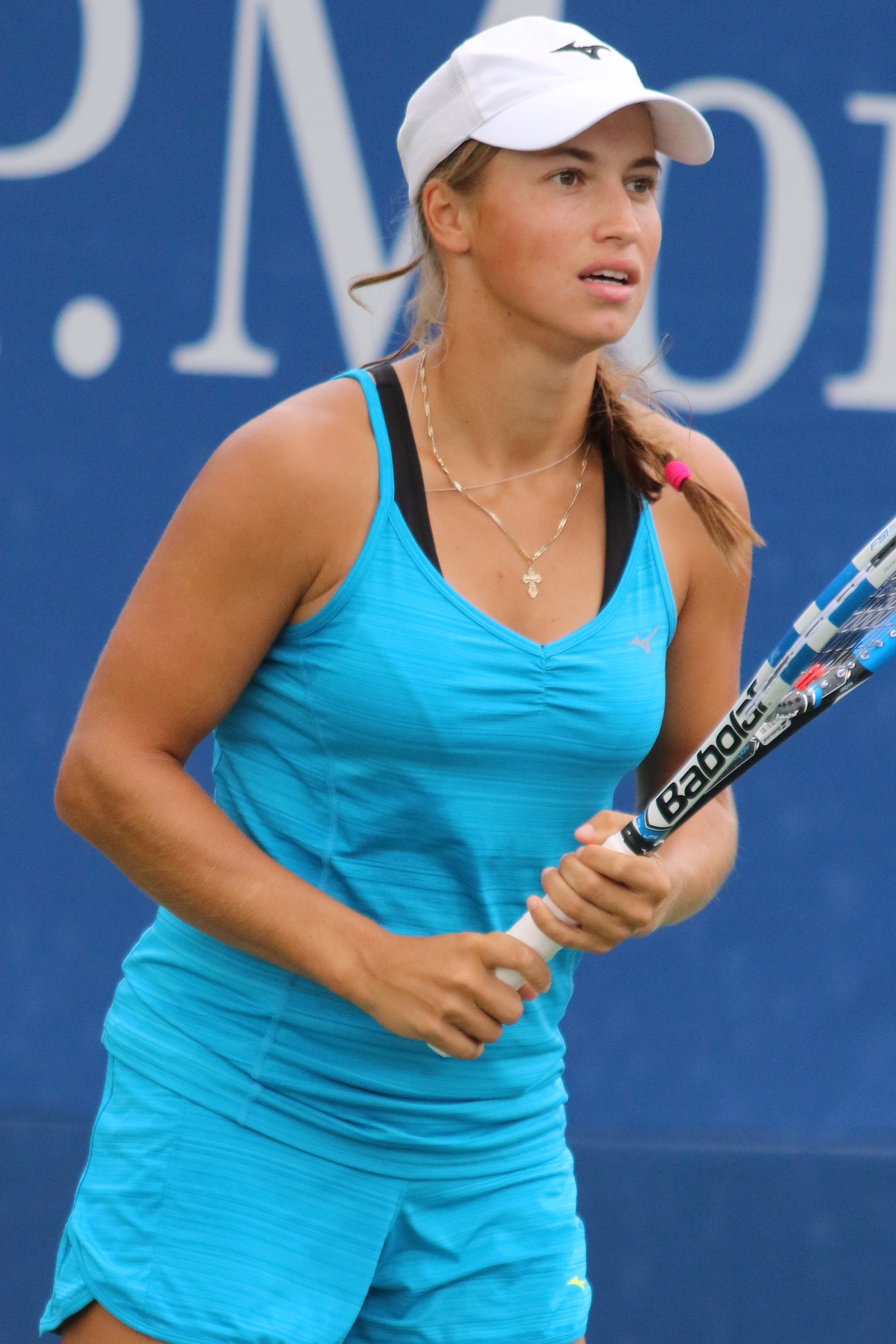 Putintseva US16 (15)